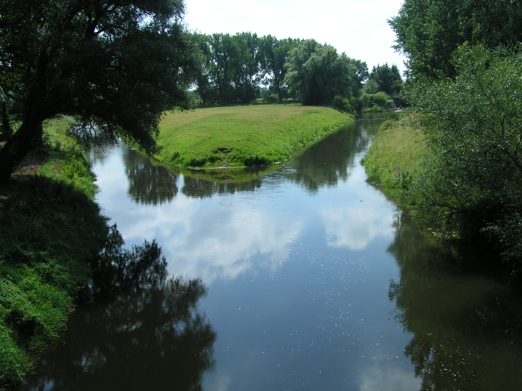 Mündung der Oker (rechts) in die Aller (links) in Müden (Deutschland); der abgebildete Bereich liegt seit 2014 im Naturschutzgebiet „Allertal zwischen Gifhorn (B 4) und Flettmar (Kreisgrenze)“